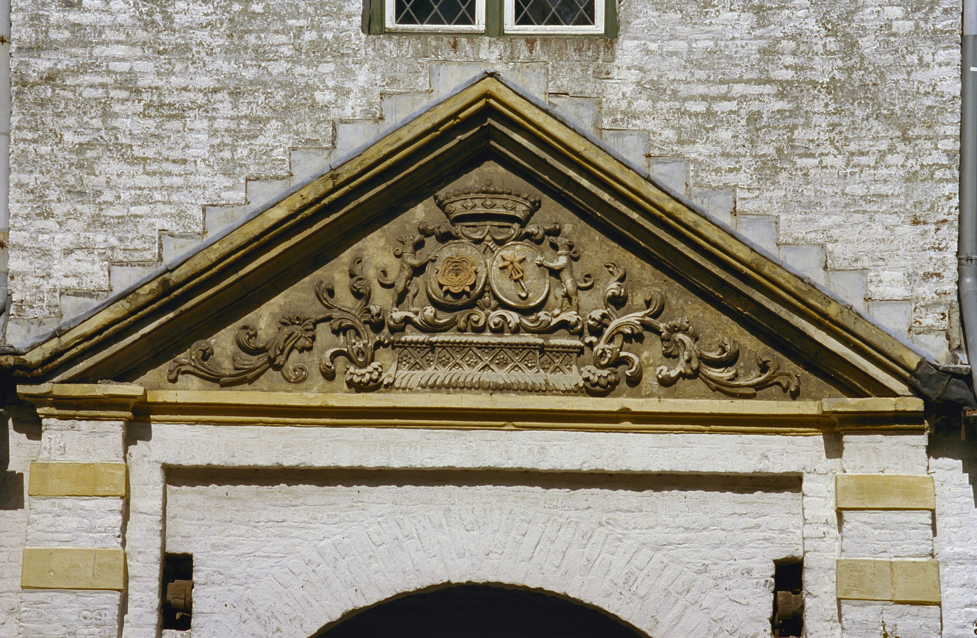 Kasteel Nieuwenbroeck: Fronton van het poortgebouw met alliantiewapen (opmerking: Gefotografeerd voor Kastelen in Limburg (1000-1800), Burchten en landhuizen)